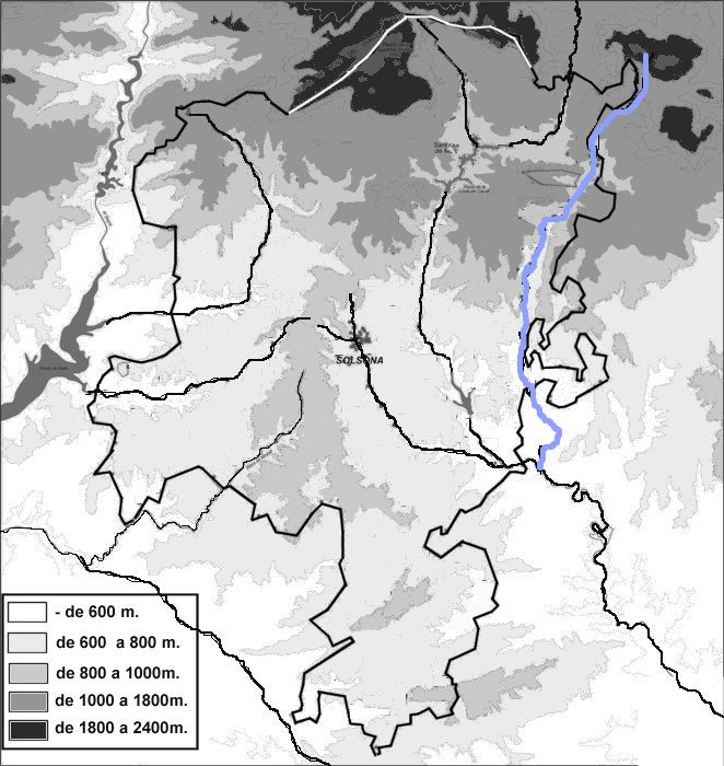 Mapa del curs del riu Aigua d'Ora